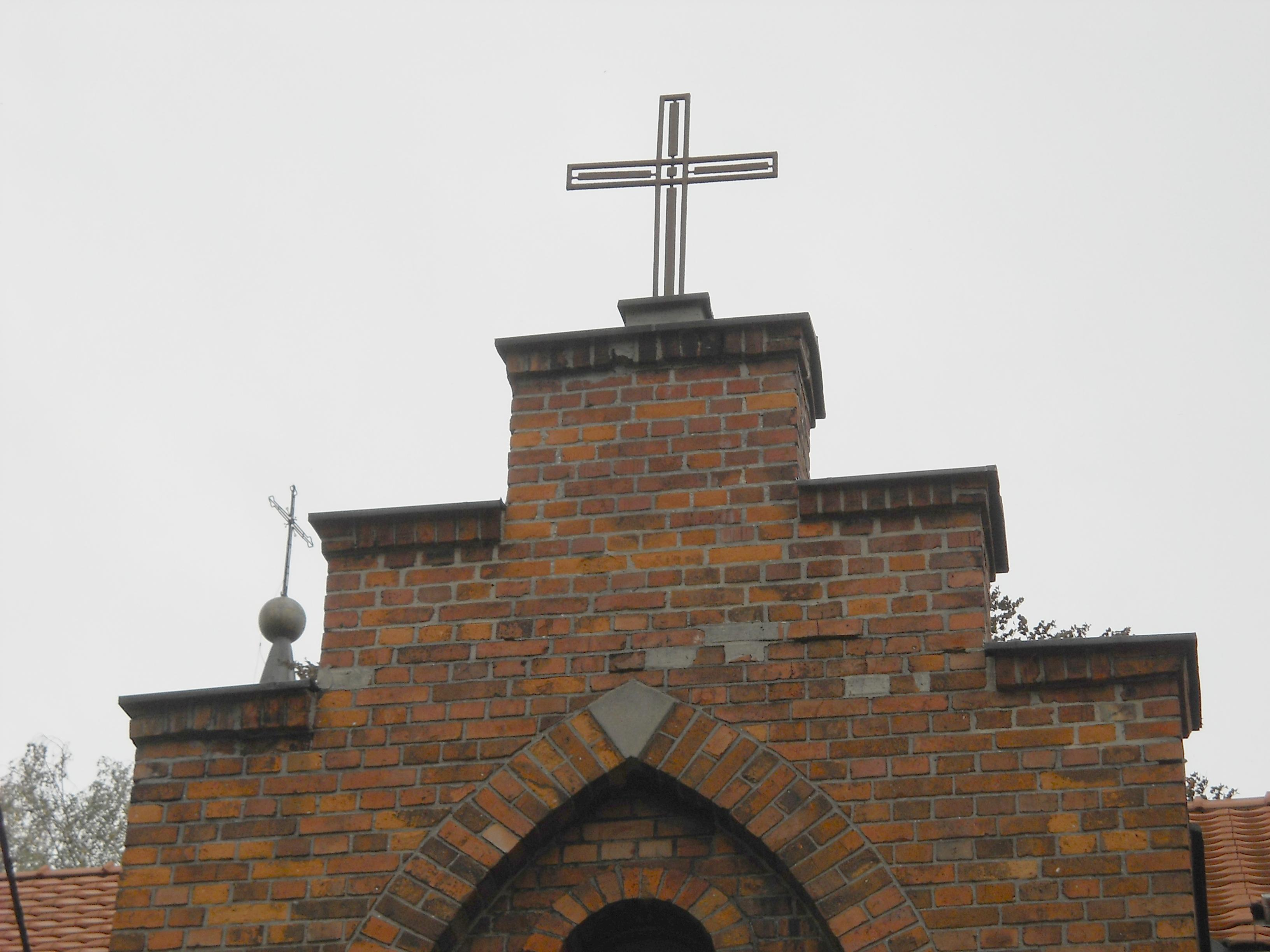 Pyskowice, ul. Poniatowskiego 10 - kościół parafialny pw. św. Mikołaja, plebania, Elementy architektoniczne (zabytek nr A/289/60 z 7.03.1960)